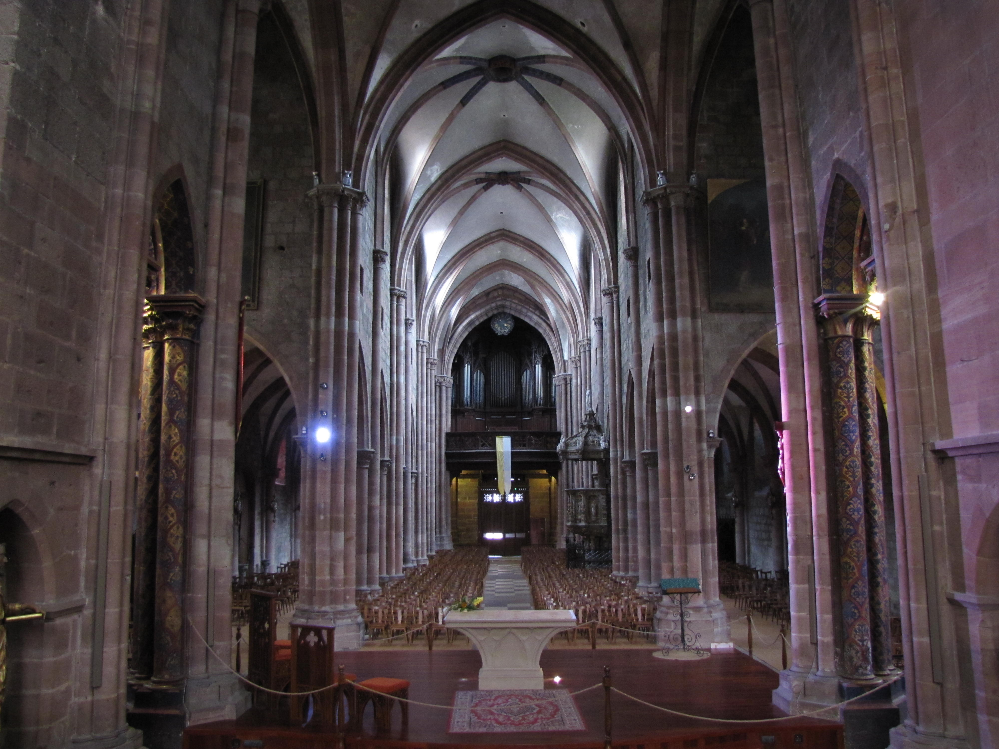 Alsace, Bas-Rhin, Sélestat, Église Saint-Georges (PA00084978, IA00124588): Vue intérieure de la nef vers la tribune d'orgue.